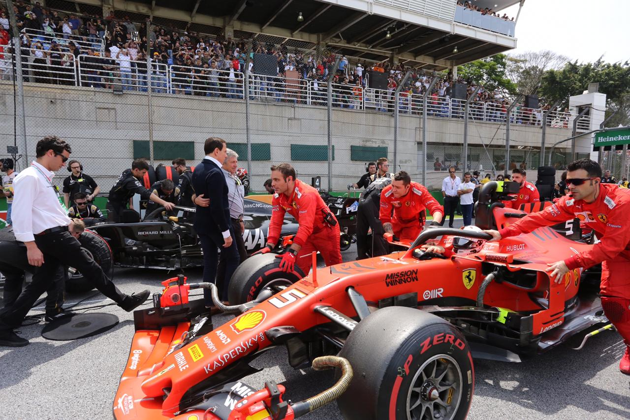 Governador do Estado de São Paulo, João Doria, durante Grande Prêmio do Brasil de F1 2019. Local: São Paulo/SP. Data: 17/11/2019